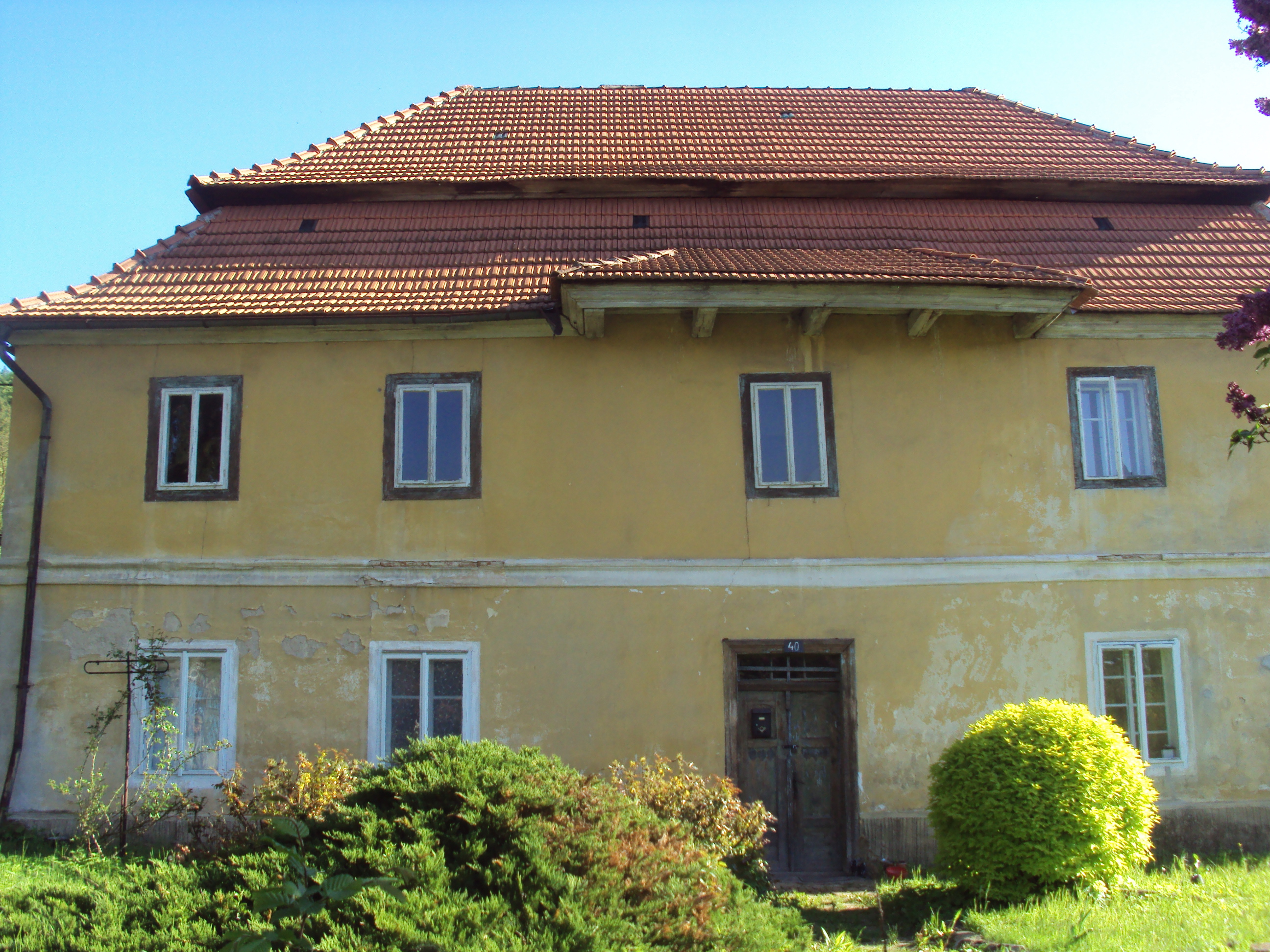 Fara u kostela v Medonosích na Kokořínsku, čp. 40.